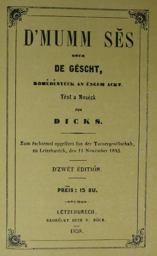 Titelblat vum Dicks (1823-1891) sengem Kaméidistéck D'Mumm Sěs. 2. Oplo, gedréckt beim V. Bück 1858.